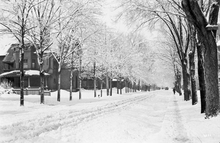 Somerset Street (Ottawa)